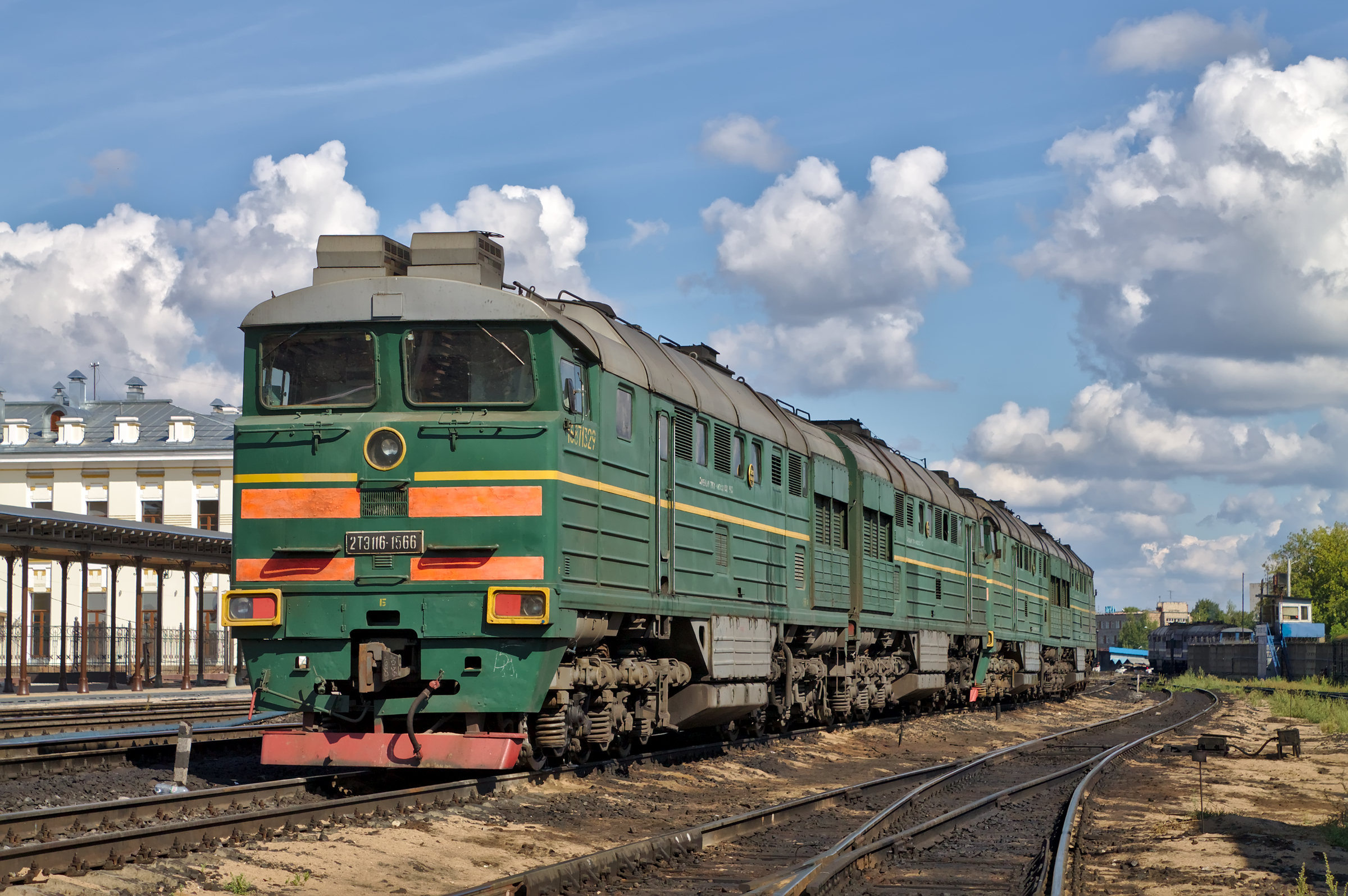 2ТЭ116-1566, станция Рыбинск-пассажирский. см. фото 614239 в альбоме автора